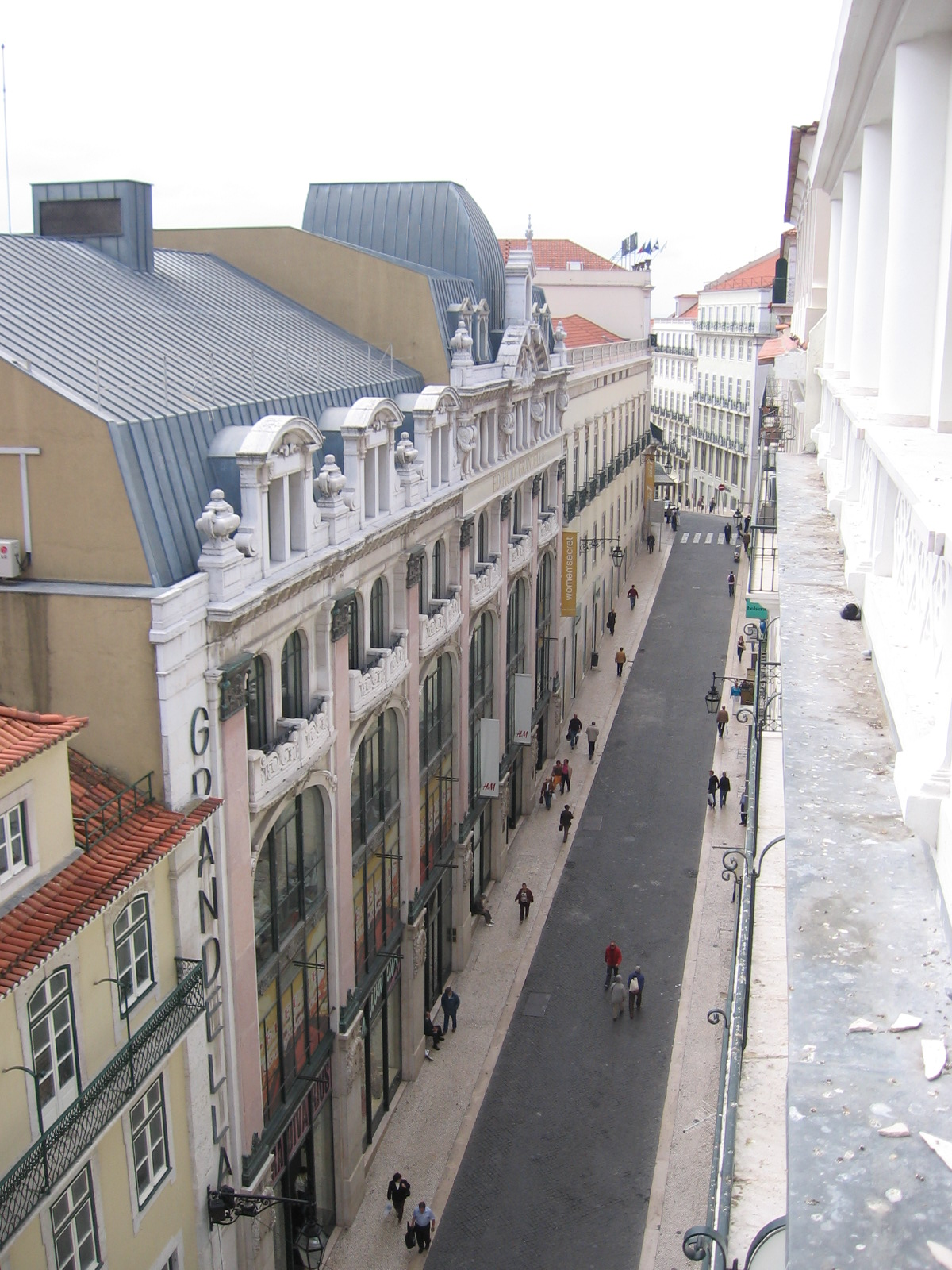 Rua do Carmo visto do passadiço do Elevador de Santa Justa, Lisboa, Portugal